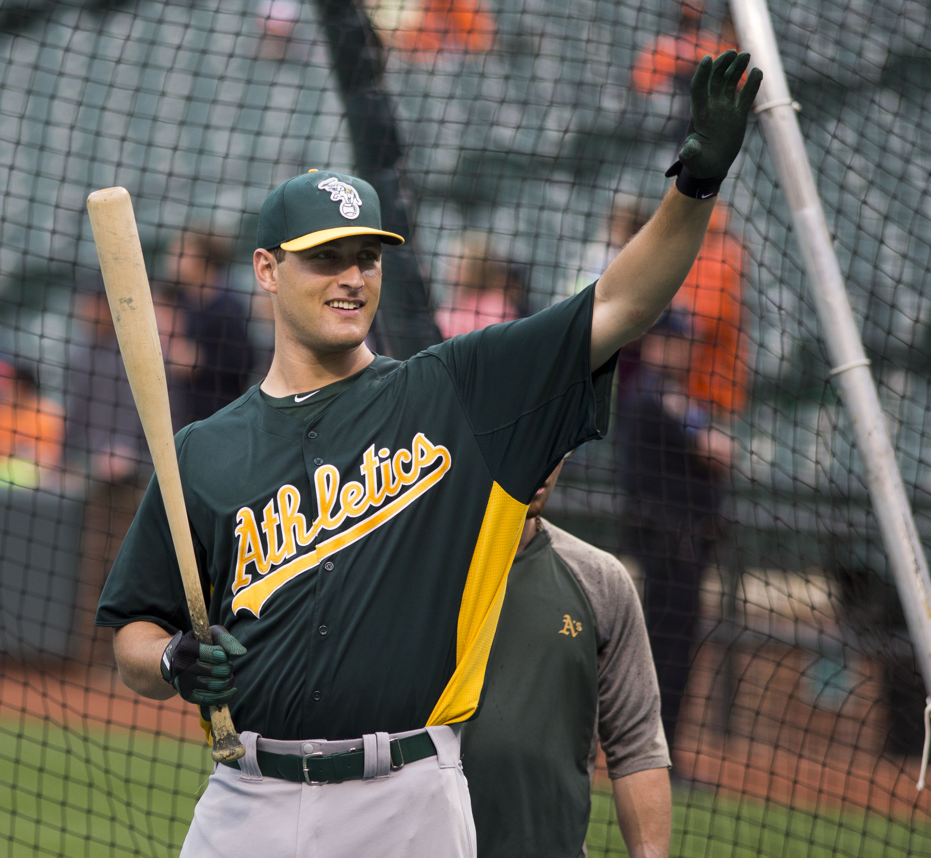 Nate Freiman